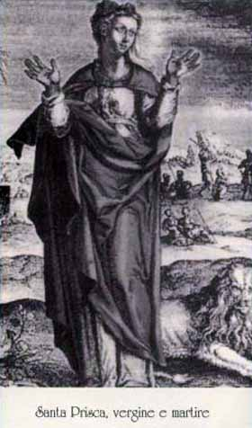 Immagine devozionale raffigurante Santa Prisca, vergine e martire del I secolo a Roma